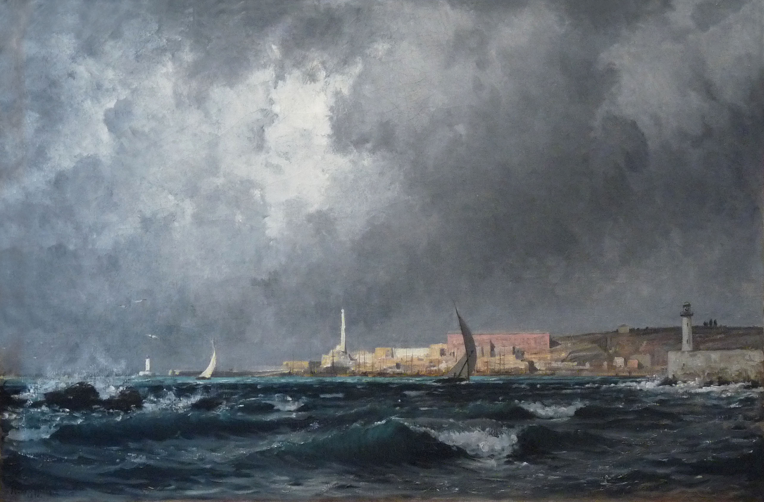 Entrée du port de Gênestitle QS:P1476,fr:"Entrée du port de Gênes" label QS:Lfr,"Entrée du port de Gênes"